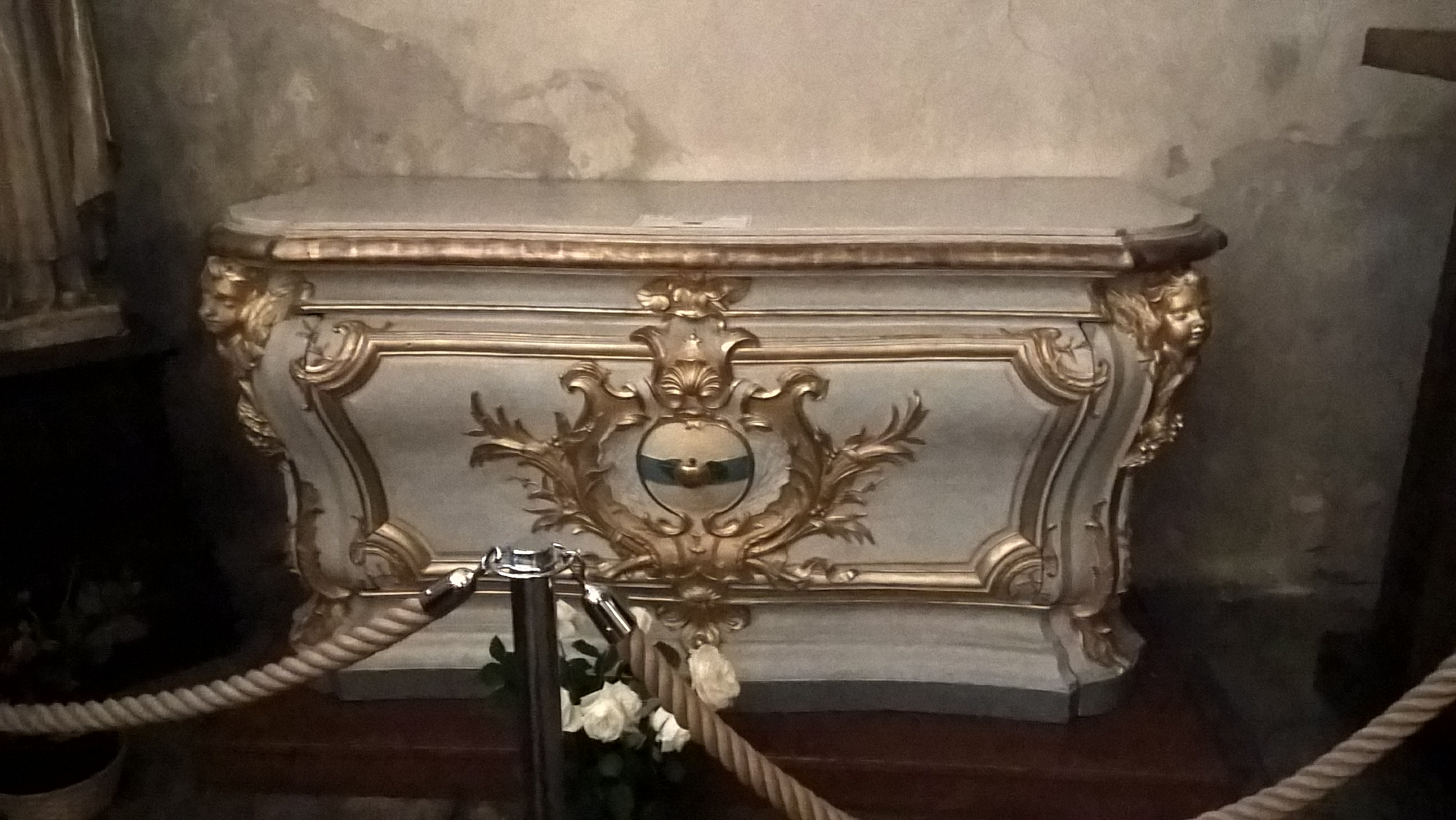 Coffre dans l'église Saint-Saturnin, à Nogent-sur-Marne.